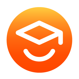 Marca apresentada a plataforma Passei Direto, em 2017